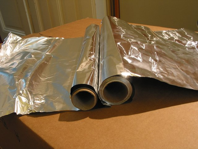 Alufolie